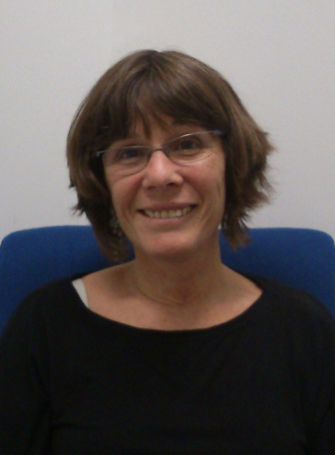 רחל לב ויזל, ראש בית הספר לטיפול באמצעות אמנויות אוניברסיטת חיפה